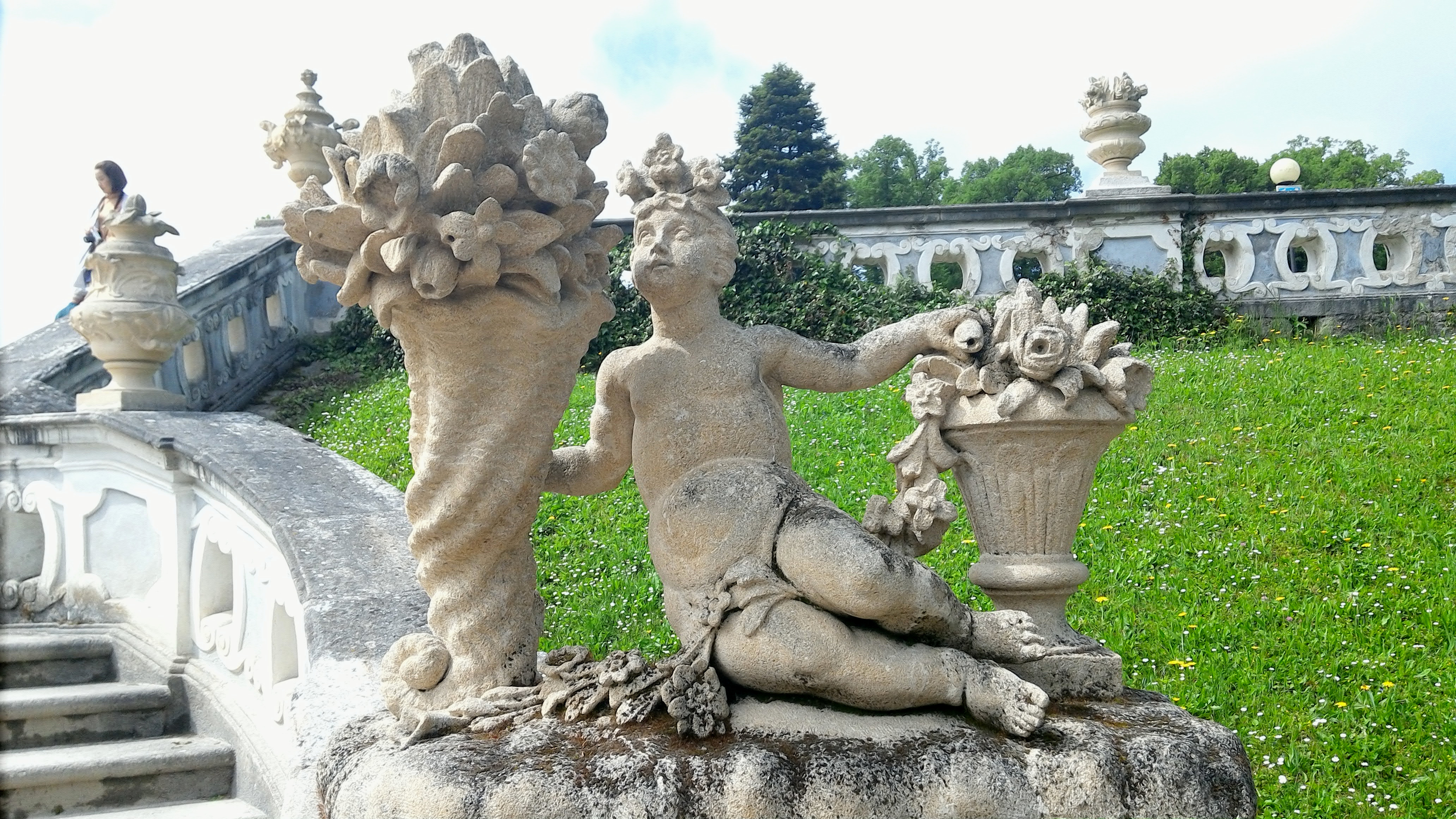 Socha označující jedno ze čtyř ročních období